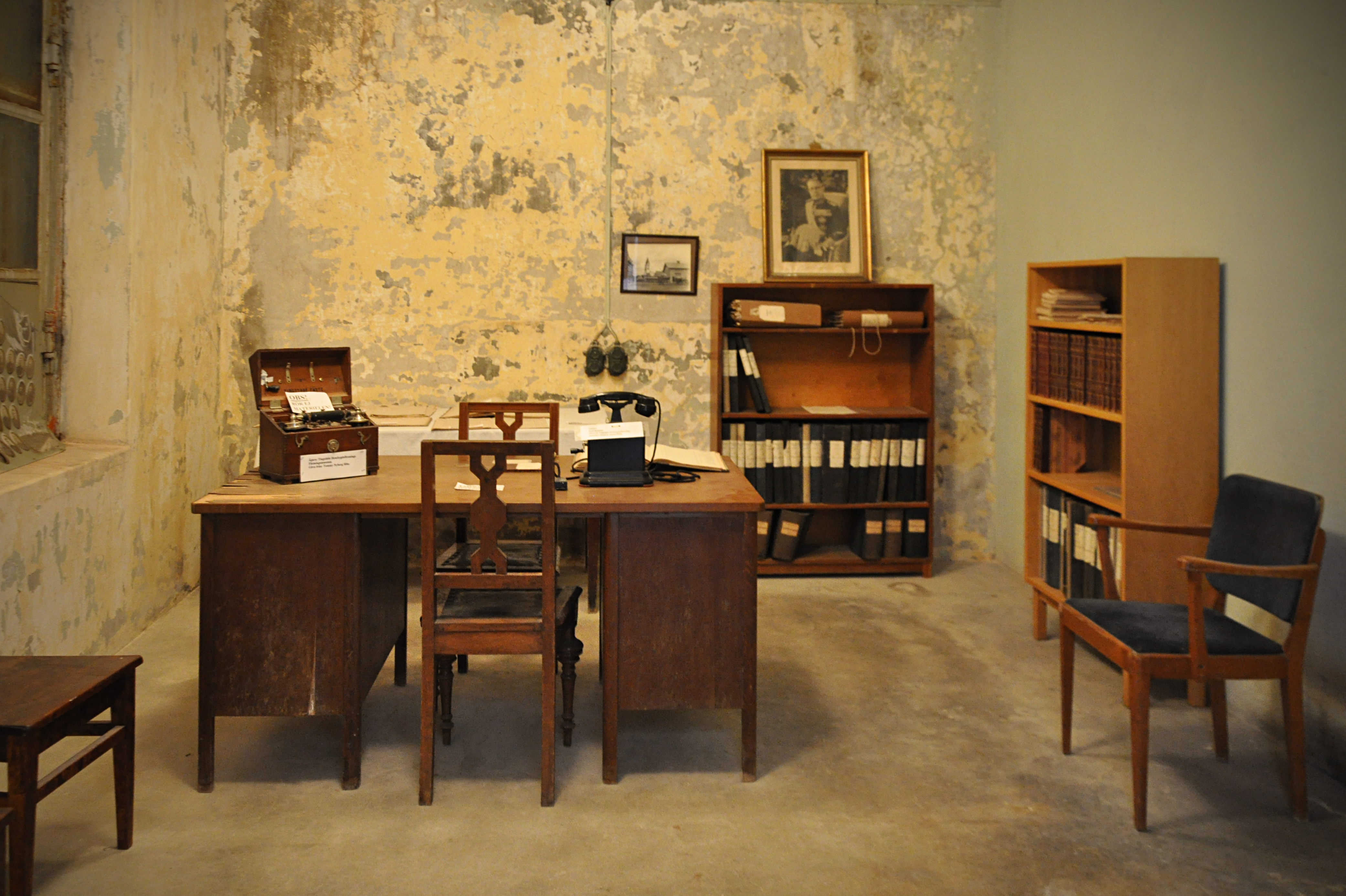 Tingstäde fästning, interiör. SFV "Hemliga rum" öppet hus 26 maj, Gotland.